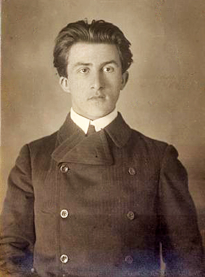 יהודה רון-פולני